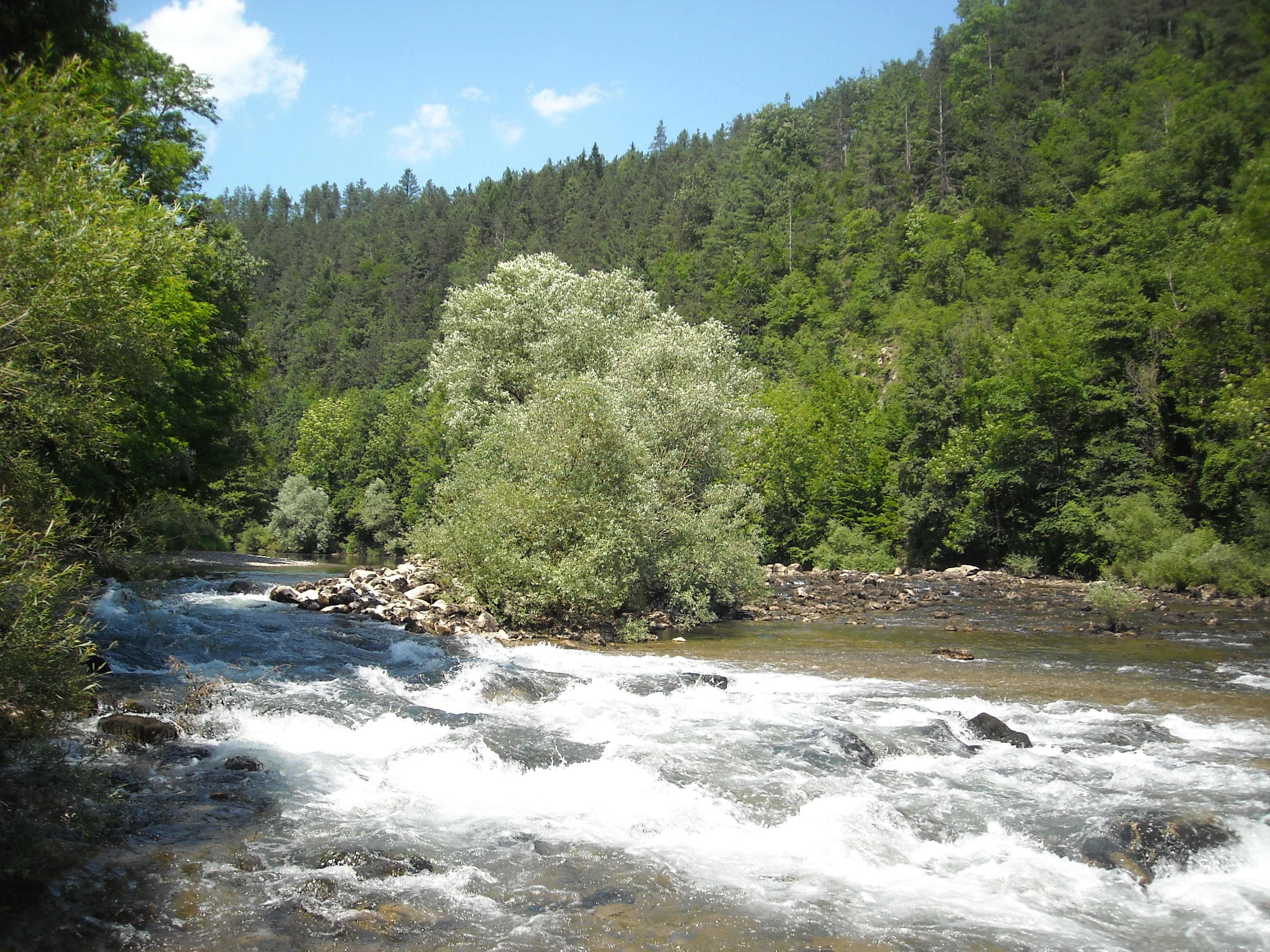 rijeka kupa(slap u Bregu)